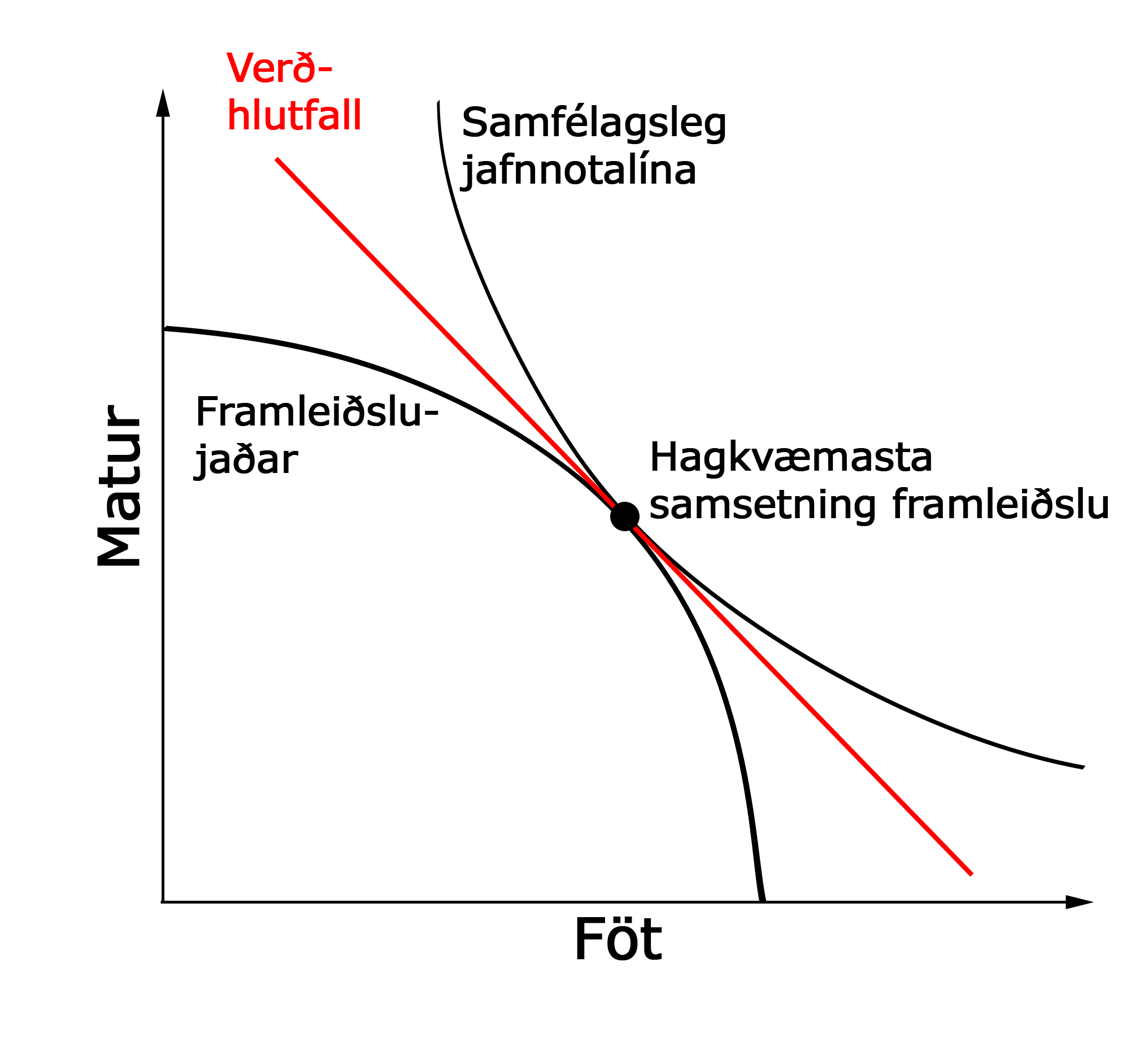 Jöfnun jaðarskipta- og jaðarnotahlutfalls